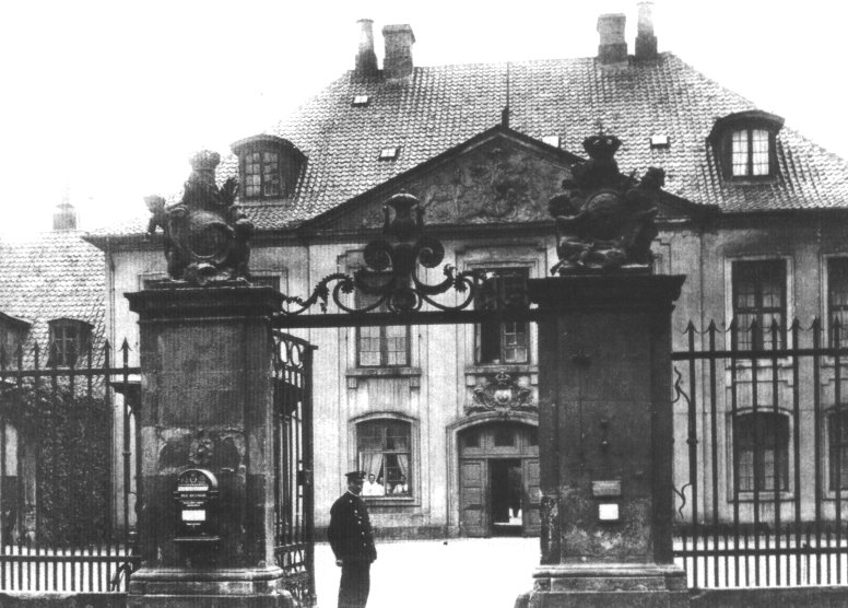 Frederiks Hospital 1757-1910 Copenhagen